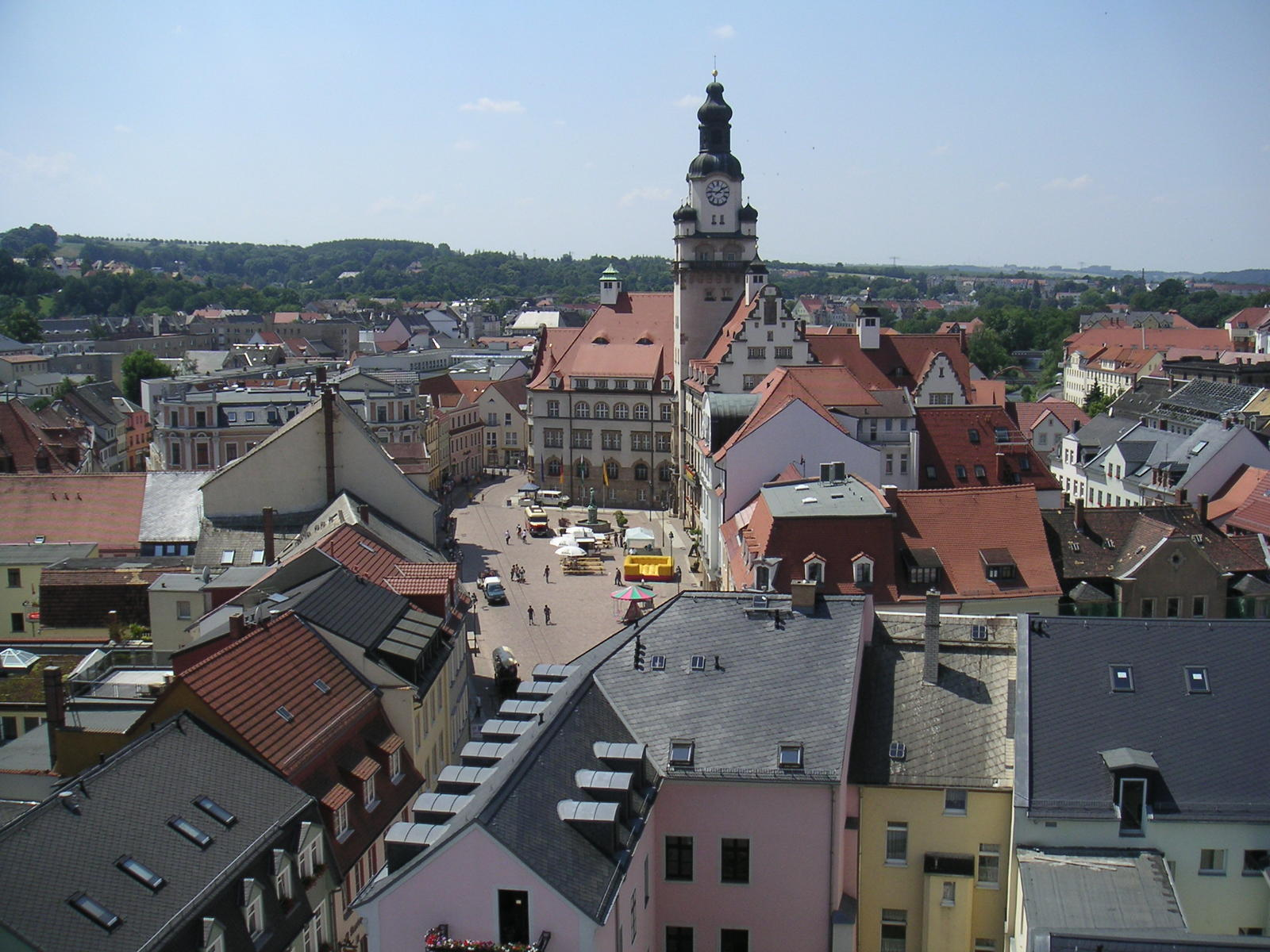 Blick vom Nikolaiturm zum Obermarkt in Döbeln - Denkmalschutzgebiet Historischer Stadtkern Döbeln.